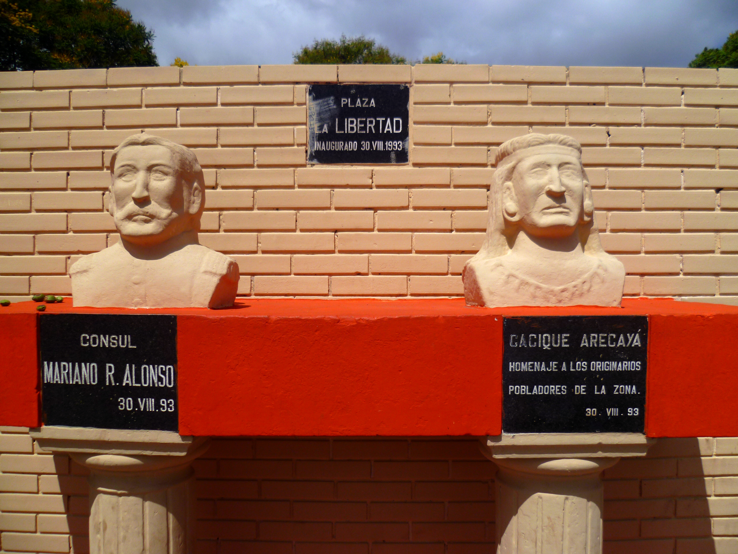 Placa conmemorativa de personajes históricos de la ciudad de Mariano Roque Alonso